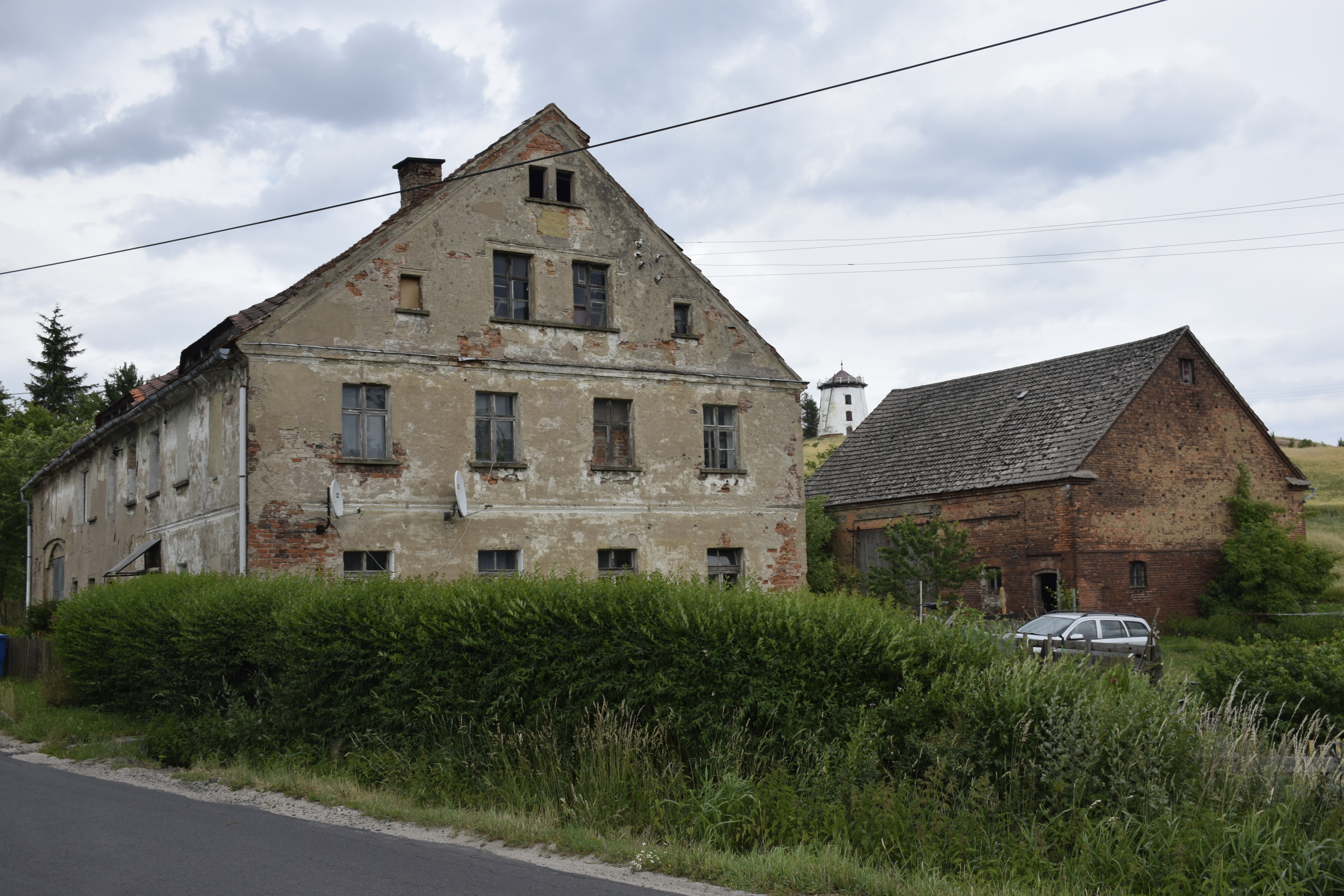 Gostków (województwo dolnośląskie). Polska